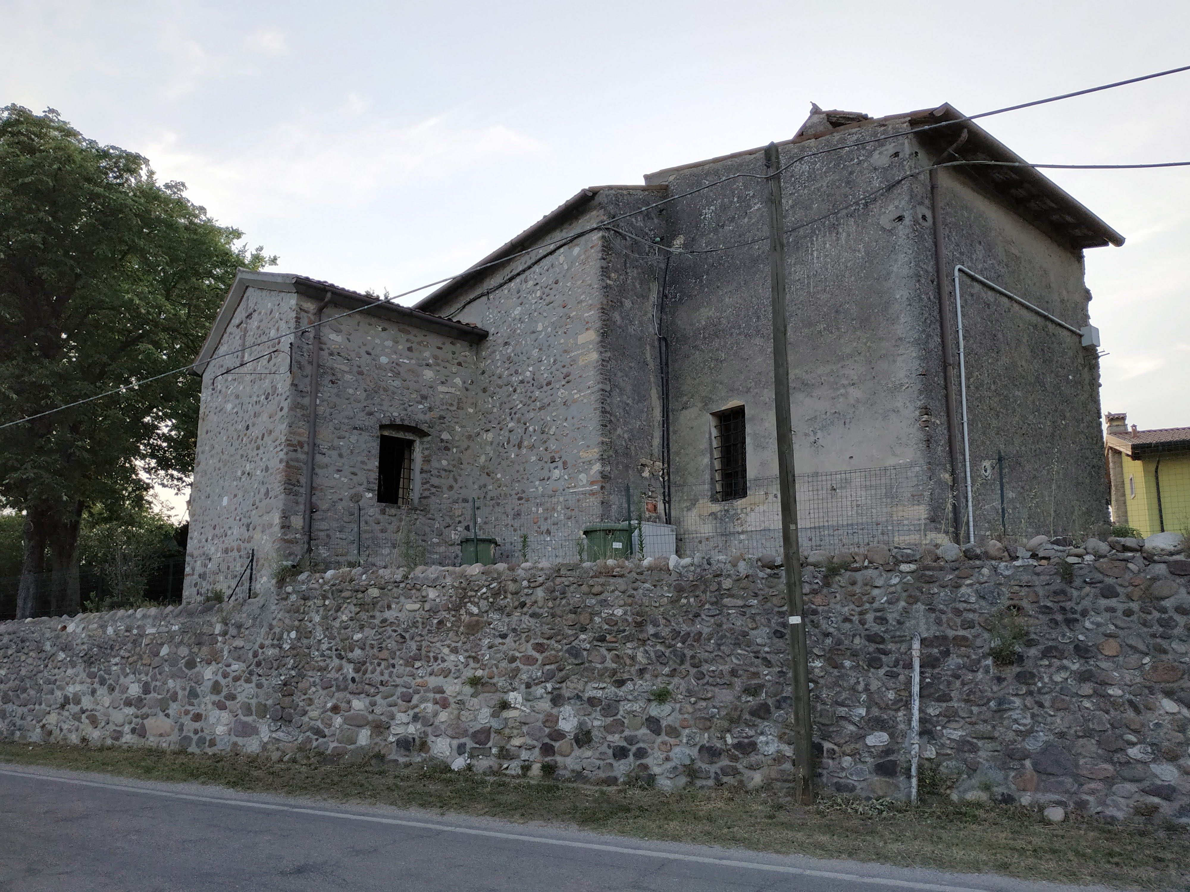 Vista dalla strada del lato destro e del muro di contenimento della chiesa di San Rocco (Sona Vr)